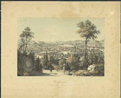 'Canstadt'. Gesamtansicht vom Karl Friedrich Sick Denkmal aus. Lithogr. mit 2 Tonplatten bei Ebner, Stgt. um 1840. 18 x 27 cm.